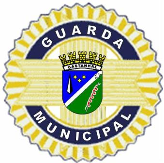 Distitivo da GMC